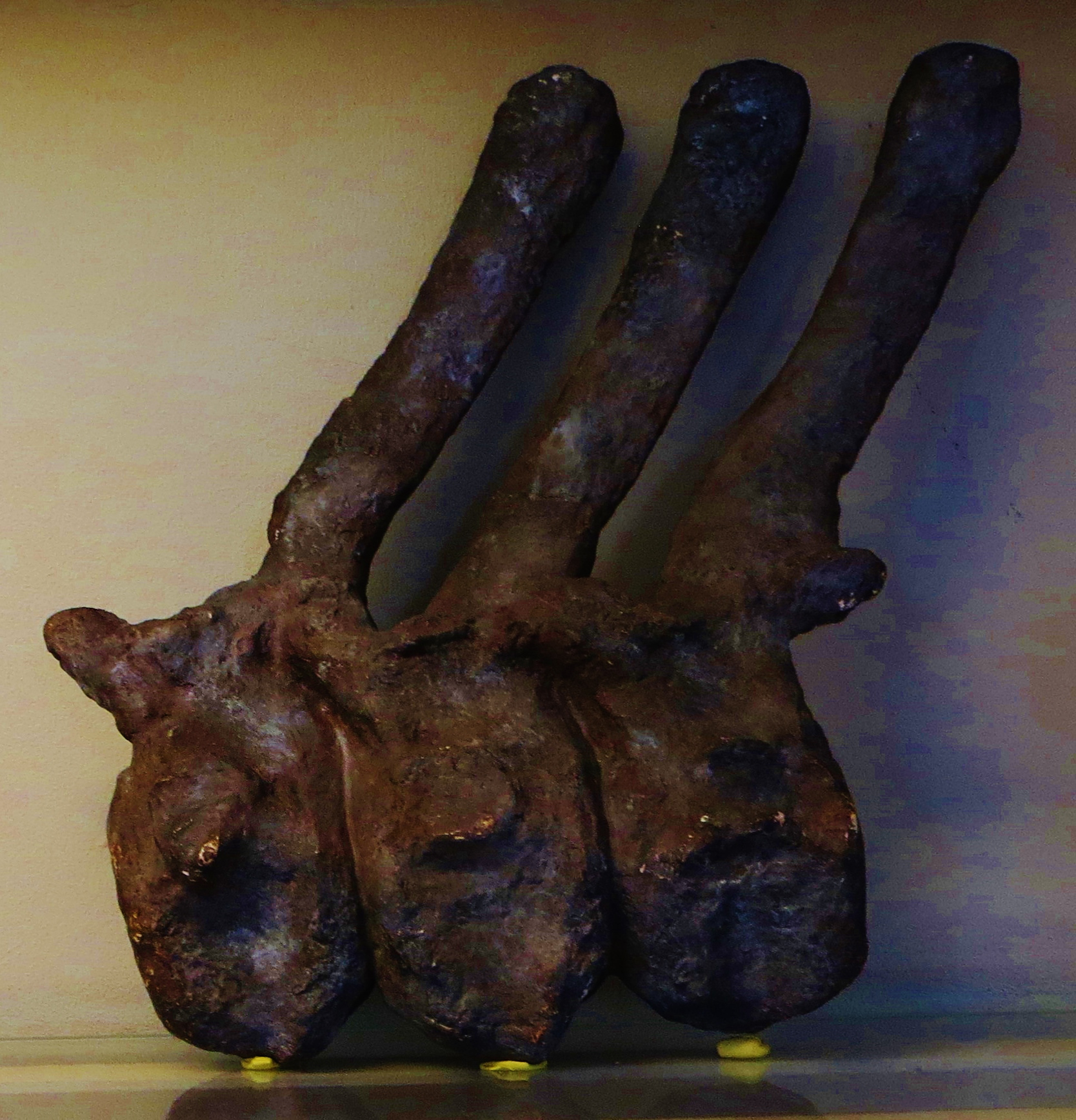 Fossil of Lexovisaurus, an extinct reptile- Took the photo at Musee d'Histoire Naturelle, Paris